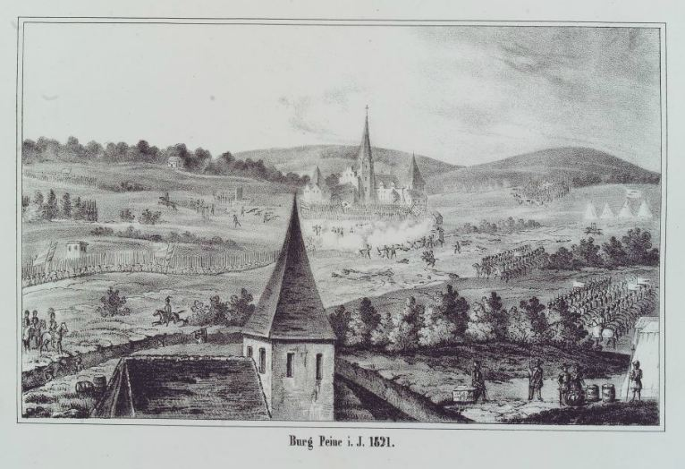 Burg Peine i. J. 1521, Lithographie aus dem 19. Jahrhundert